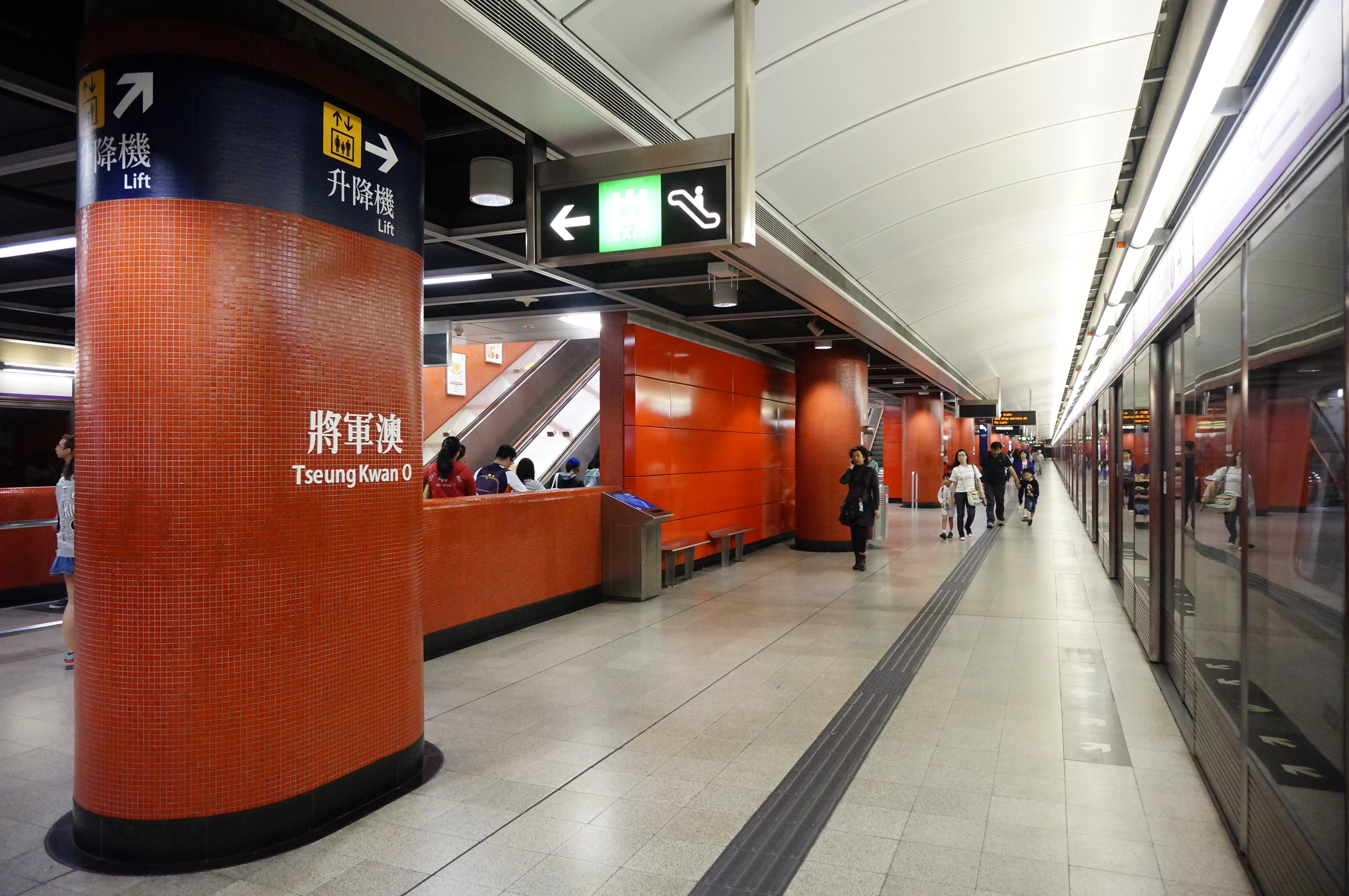 港鐵將軍澳站月台